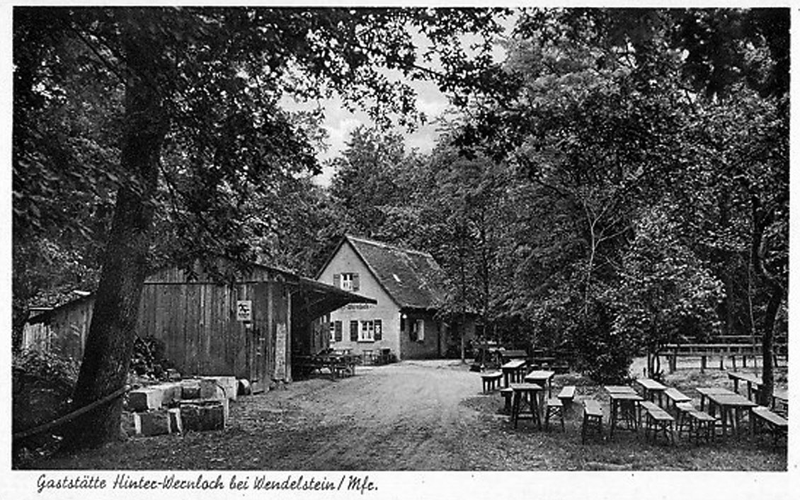 Ehemaliges Gasthaus Wernloch, Wendelstein, Mittelfranken